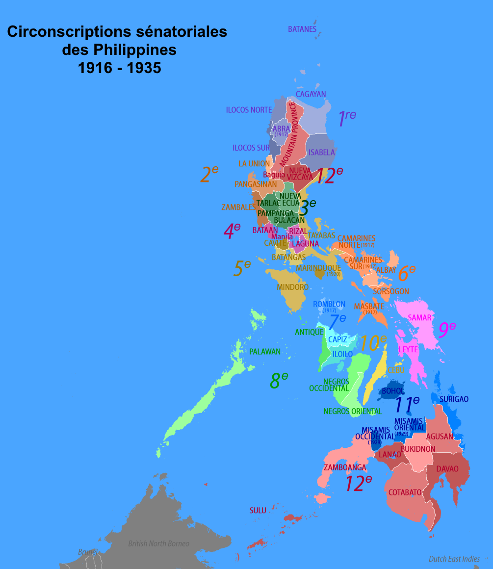 Carte des douze circonscriptions sénatoriales des Philippines qui ont existé de 1916 à 1935